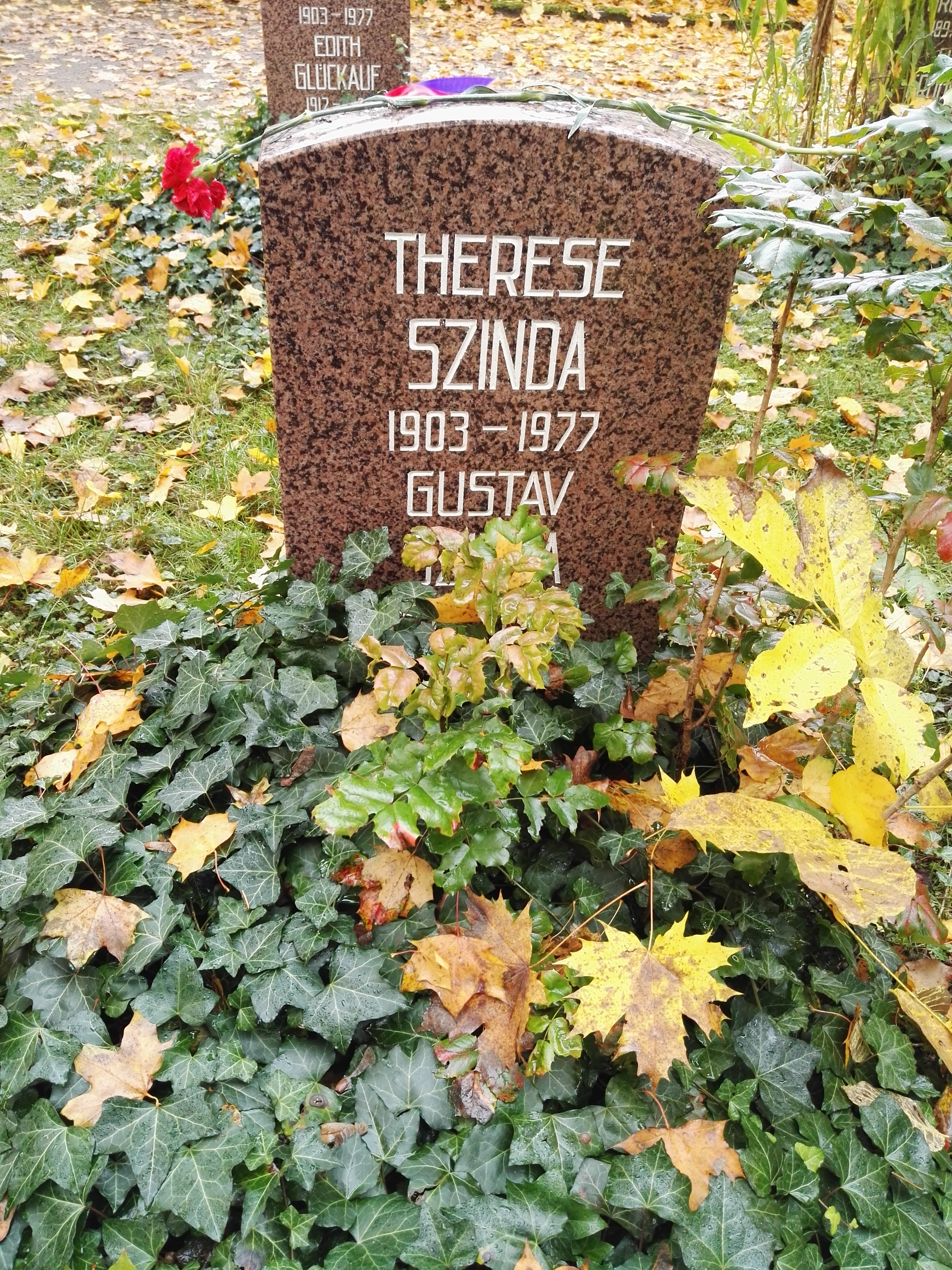 Grab von Gustav Szinda und Therese Szinda auf dem Sozialistenfriedhof des Zentralfriedhofs Friedrichsfelde